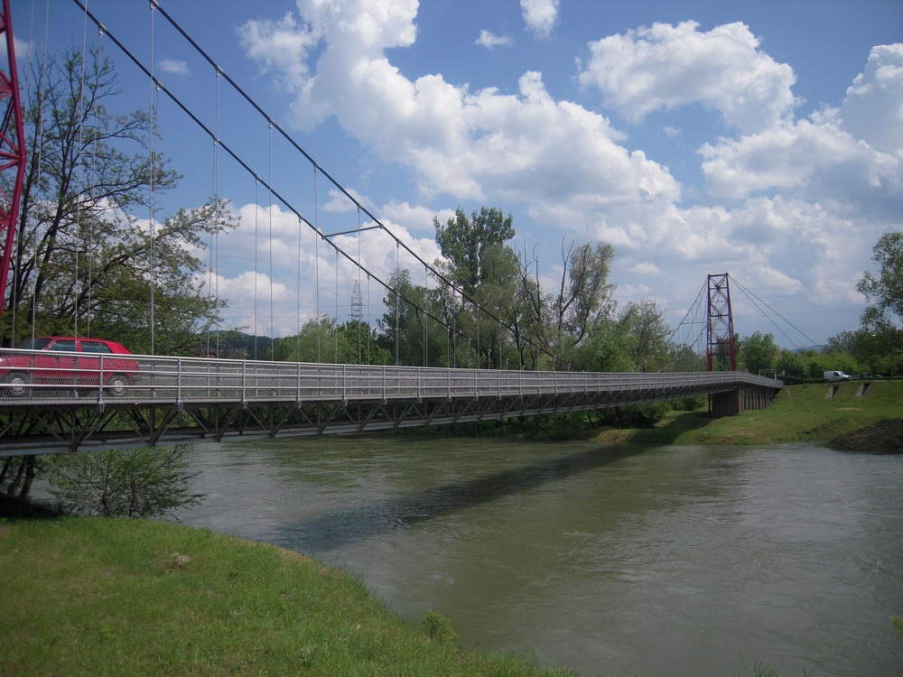 Most u Česmi (Banja Luka)